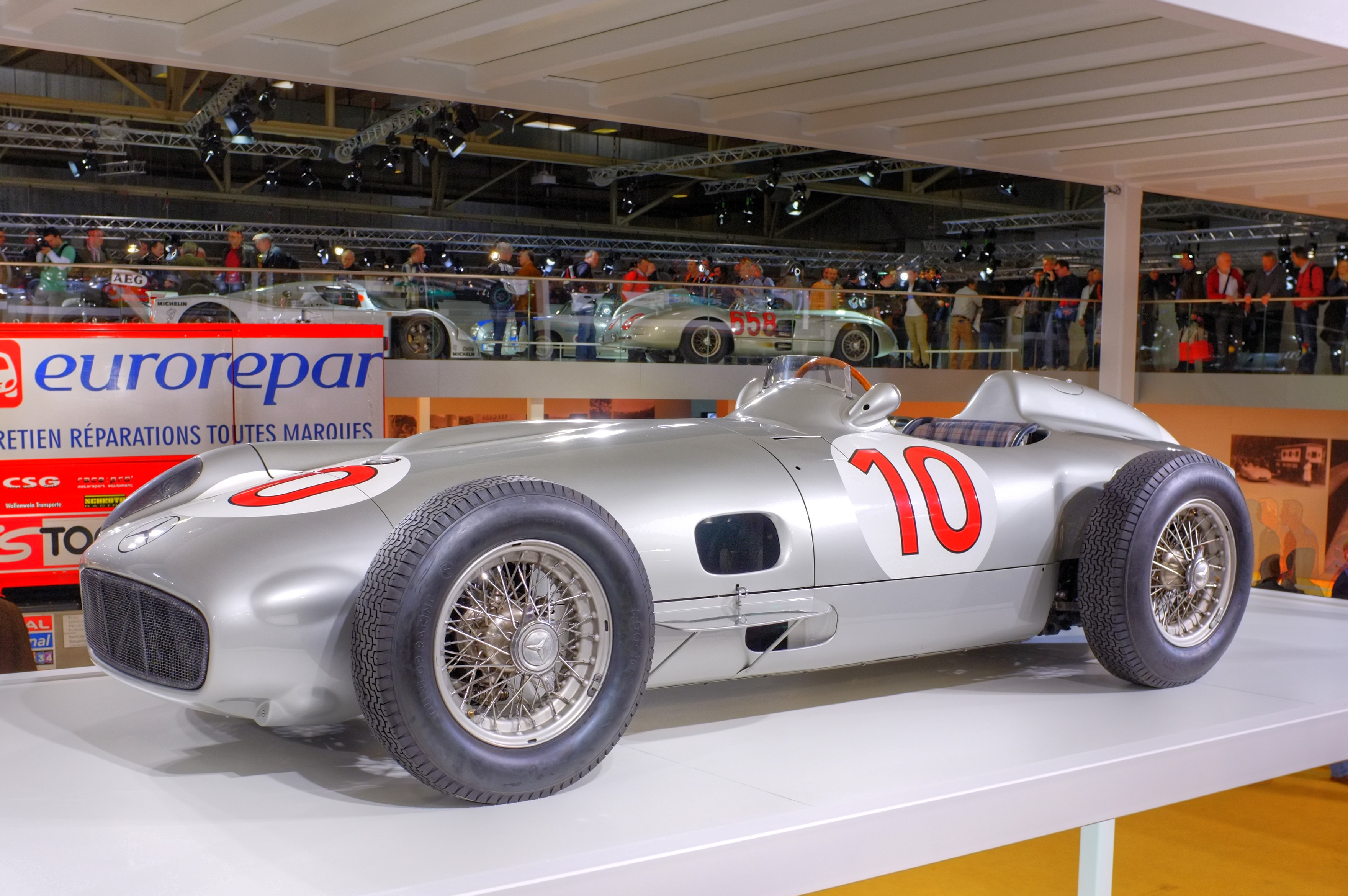 Techno Classica 2014